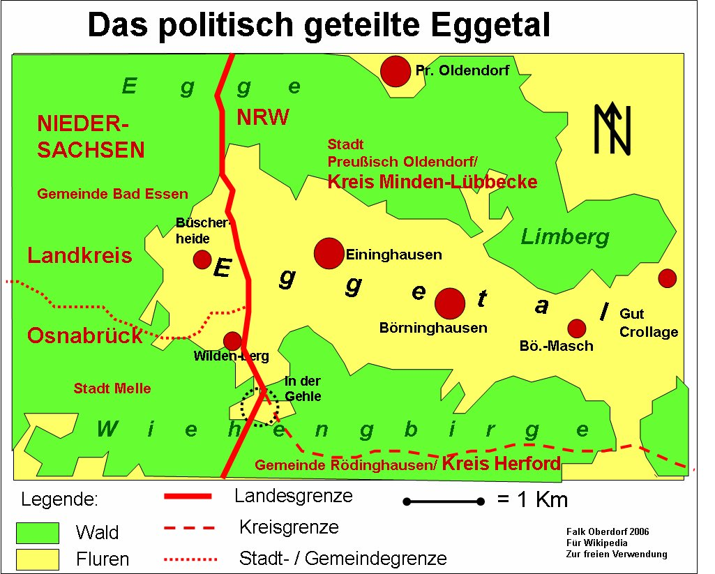 Karte des Eggetals in Nordrhein-Westfalen und Niedersachsen.